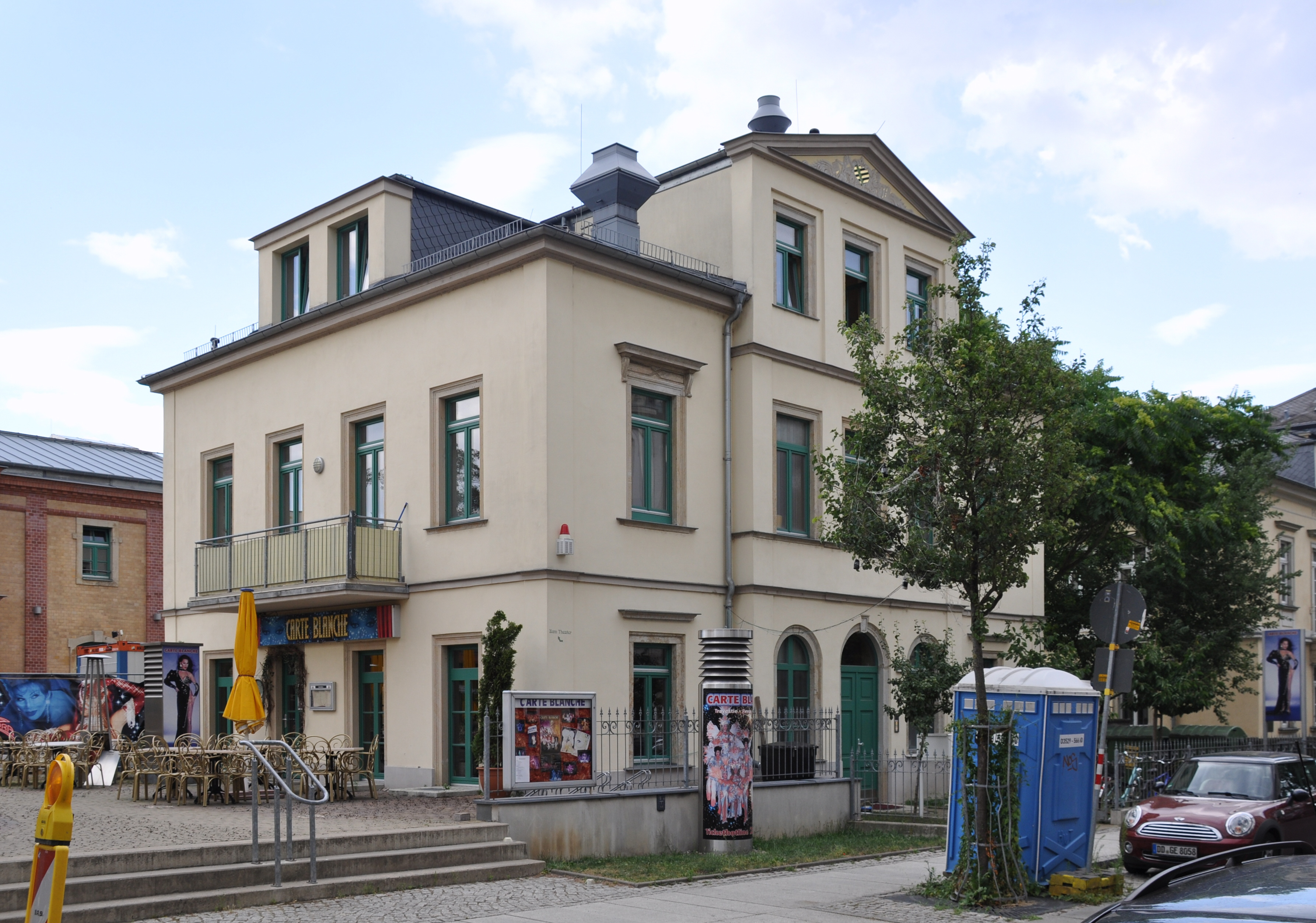 Dresden, Theater Carte Blanche, Prießnitzstraße 12